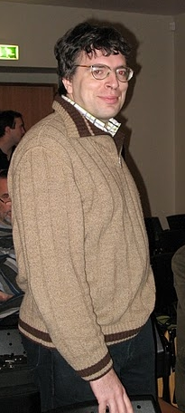 Toomas Trapido Erakonna Eestimaa Rohelised Tallinna piirkonna asutamiskoosolekul Tallinna Ülikooli peahoones